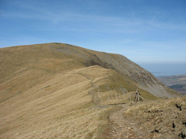 Mynydd Perfedd from Foel Goch